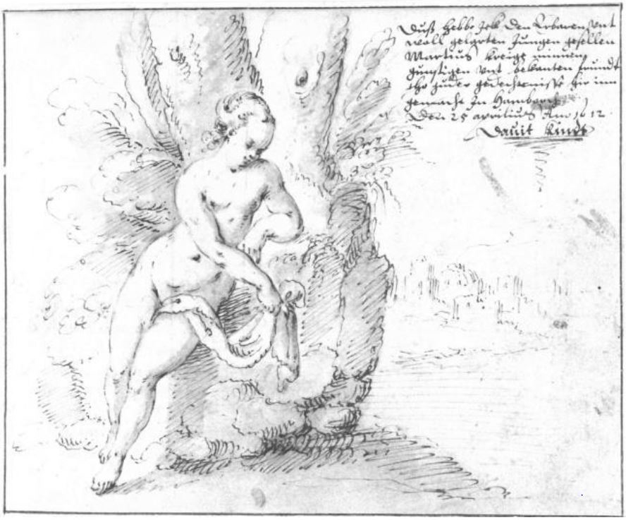 David Kindt: Nackte Frau in Landschaft, Tinte und Kreide auf Papier, 18,2 × 14,4 cm. Inschrift: „Dieß hebbe ick den erbaren unt / woll gelärten Jüngen gesellen / Martinus Kreiges minnen / günstigen unt bekannten freundt/ also gütes gedechtnisse für imm / gemacht zu Hamburg / den 25 avrilius Ano 1612 / Davit Kindt“ – Der heutigen Schreibweise angepasst: „Dies habe ich den ehrbaren und / wohlgelehrten Junggesellen Martinus Kreiges / meinen günstigen und bekannten Freund / als gutes Gedächtnis für ihn / gemacht zu Hamburg / den 25. April im Jahre 1612 / David Kindt“